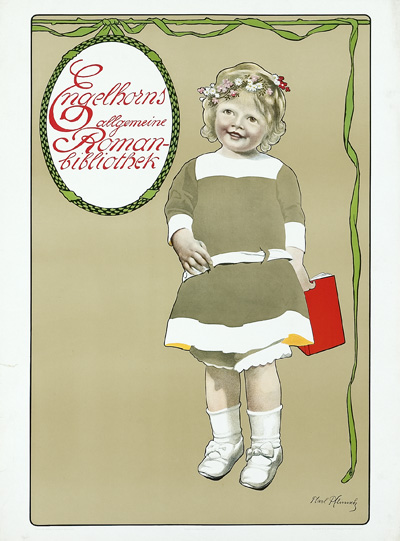 Werbeplakat als Vielfarbdruck in den Maßen circa 79,5 x 58,2 cm, gedruckt und vertrieben von der Union Deutsche Verlagsgesellschaft sowie A. Schuler Chemigraphische Kunstanstalt nach einem Entwurf von Karl Klimsch für Engelhorns allgemeine Romanbibliothek, Verlag J. Engelhorn, Stuttgart ...